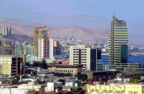 Vista de la la zona costera de Antofagasta, Chile. Fotografía tomada por . Aus der spanischen Wikipedia aus dem Artikel Antofagasta.